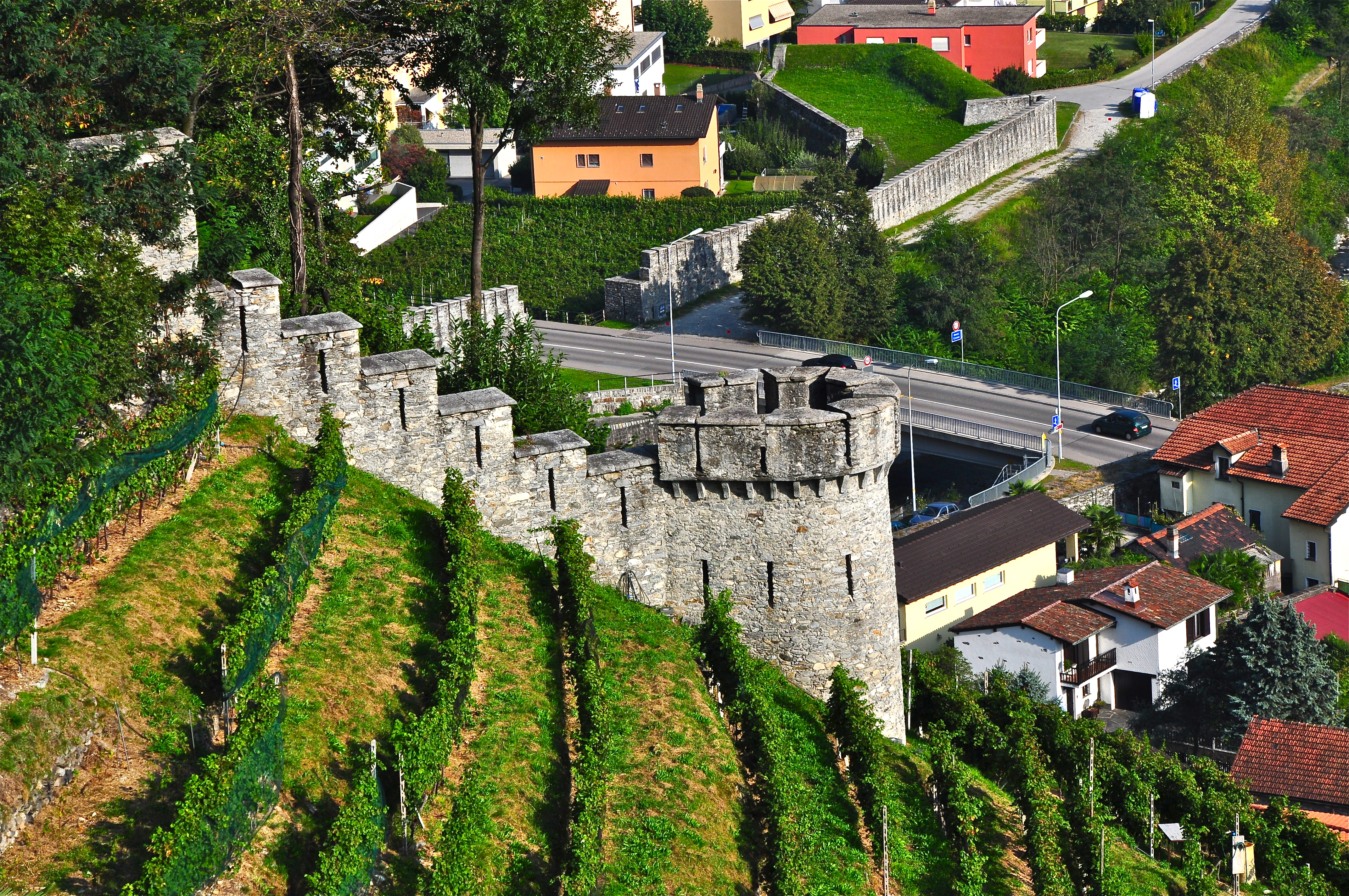 Torre di osservarzione e parte della murata in città.